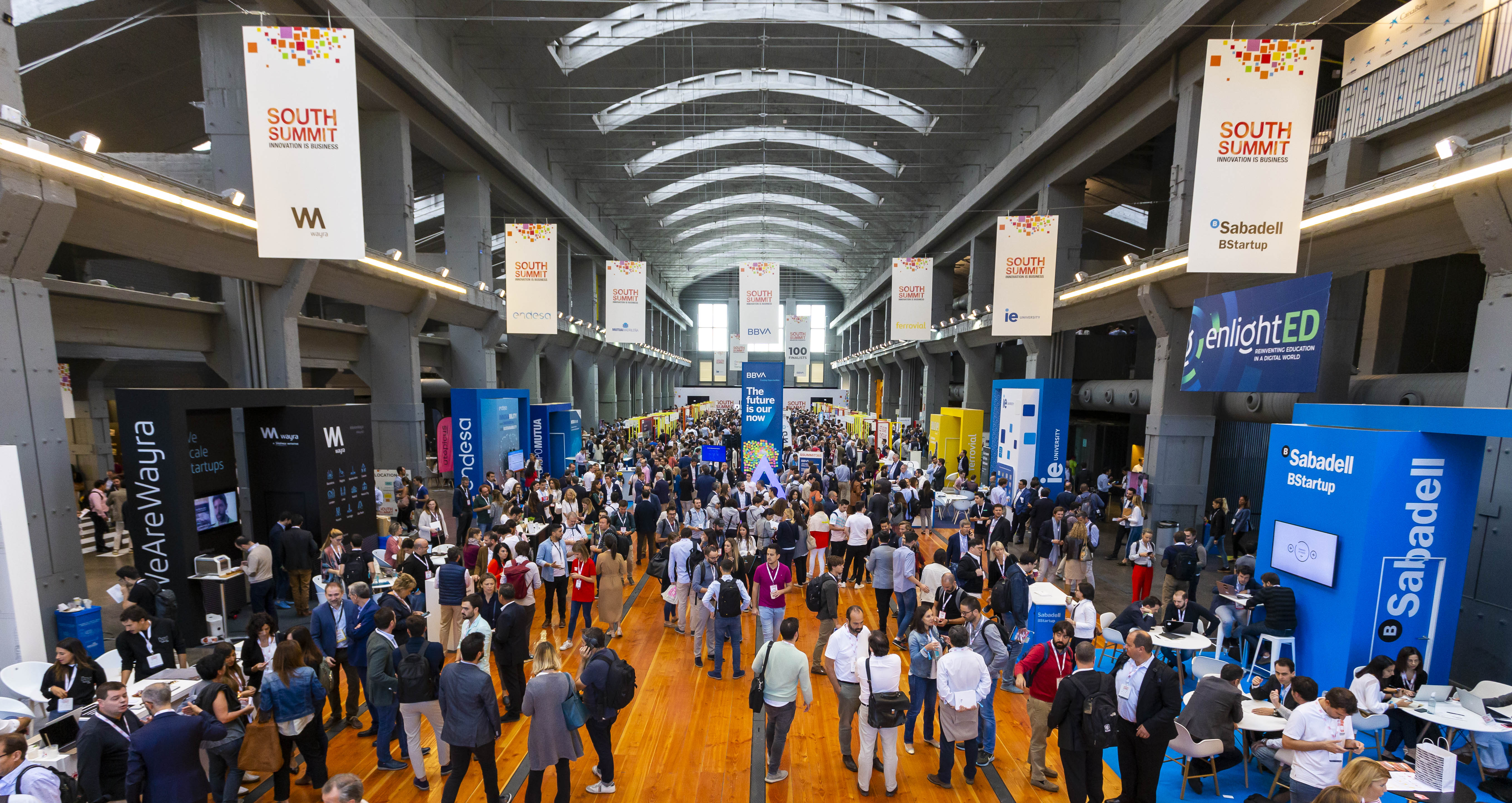 Zona del marketplace en South Summit 2019 (La Nave, Madrid)